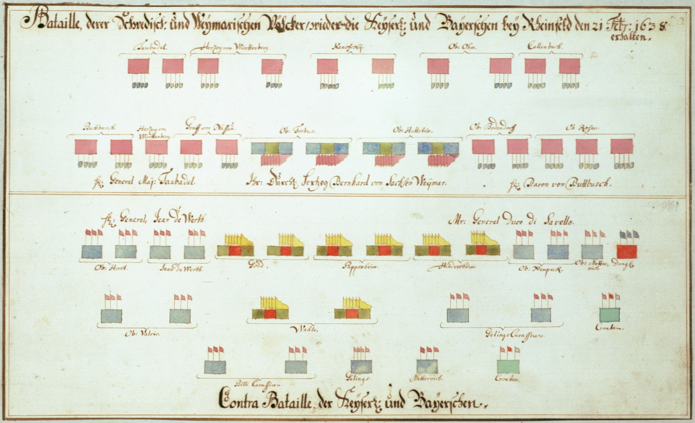 «Bataille derer schwedischen und weimarischen Völker wider die kaiserl. und bayerischen bei Rheinfeld den 21 Febr. 1638 erhalten.» (Aufstellung der schwedischen und weimarischen Truppen gegen die kaiserlichen und bayerischen Truppen bei der Schlacht bei Rheinfelden am 21. Februar 1638 nach julianischem Kalender = 3. März 1638 nach gregorianischem Kalender), farbige Handzeichnung.